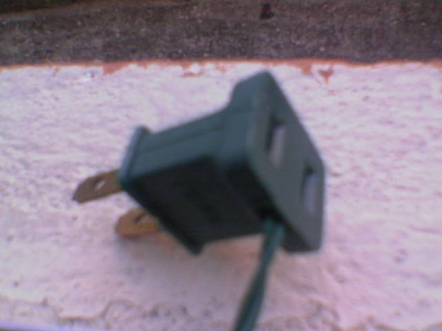 Tomada de Pisca-Pisca que possibilita a inserção de outra.